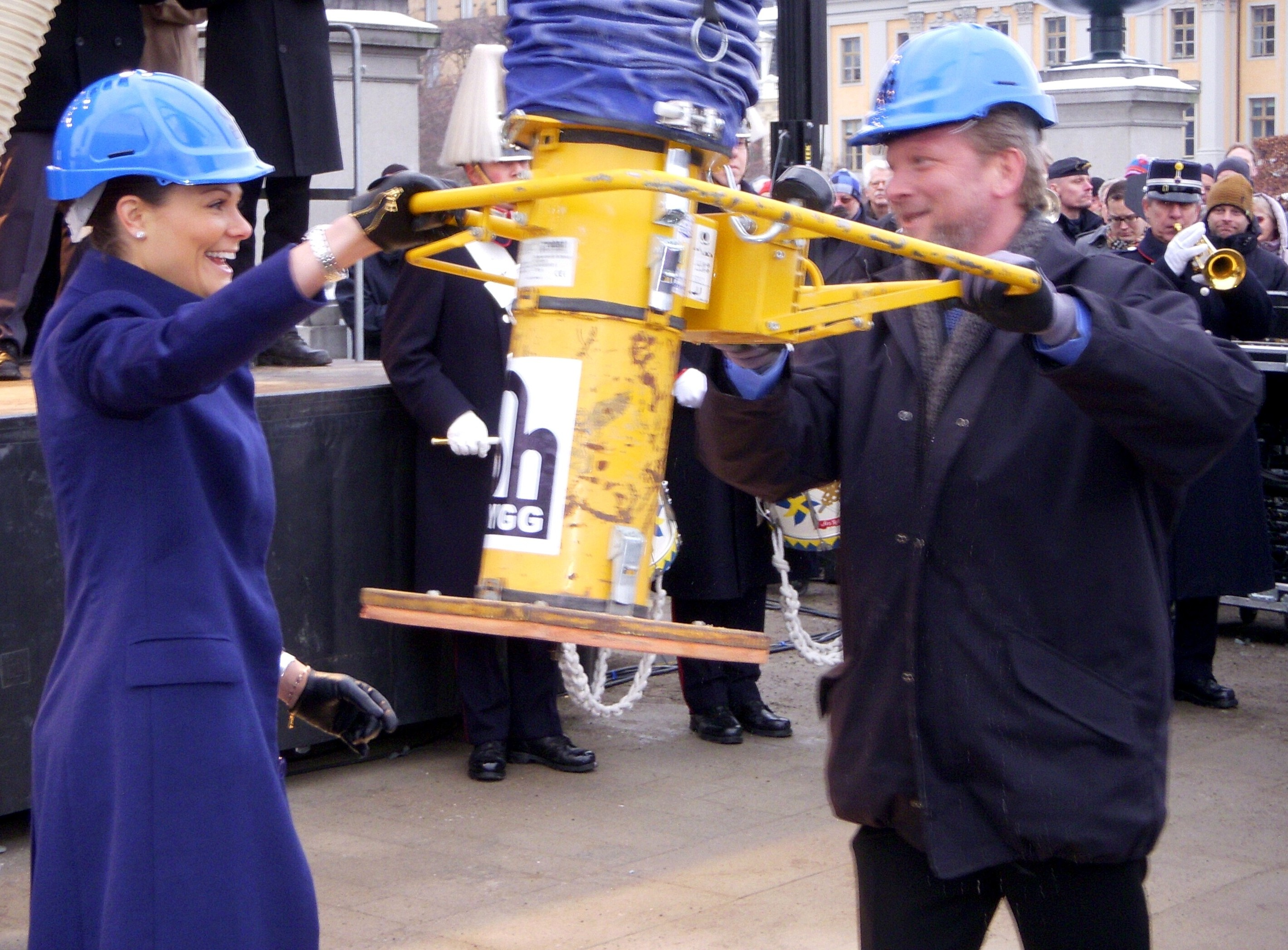 Återinvigning av Norrbo genom kronprinsessan Victoria 2010-01-23 (sista stenen ligger)